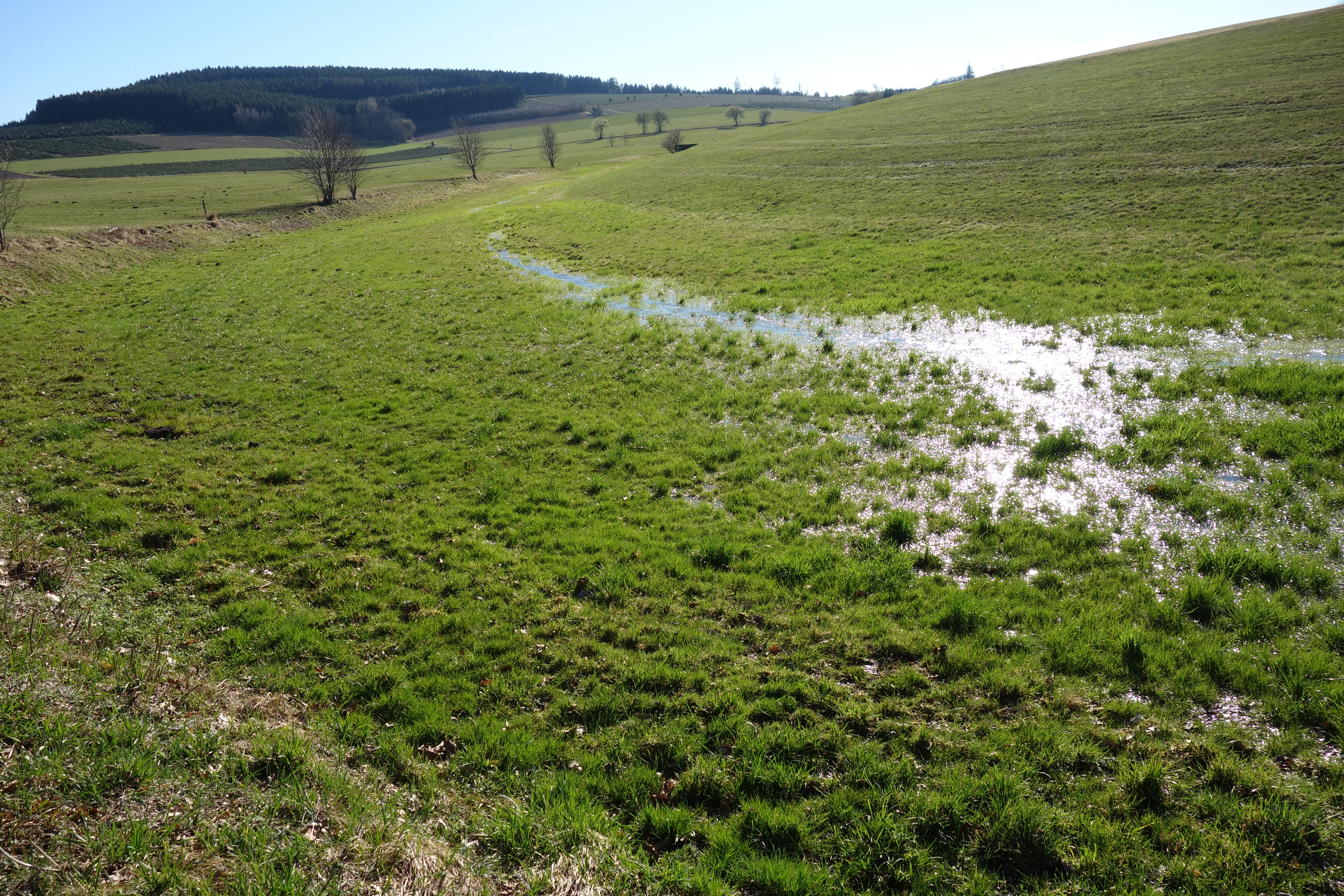 "Landschaftsschutzgebiet Oberlauf der Kleinen Henne nordwestlich Westernbödefeld" im Vordergrund (westliche Teil)und im Hintergrund das Landschaftsschutzgebiet Schmallenberg Südost.